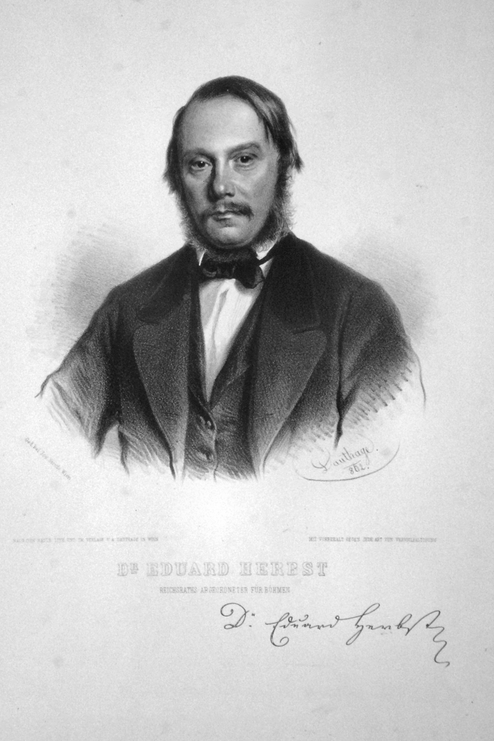 Eduard Herbst (1820-1892), Jurist, Politiker. Lithographie von Adolf Dauthage, 1862